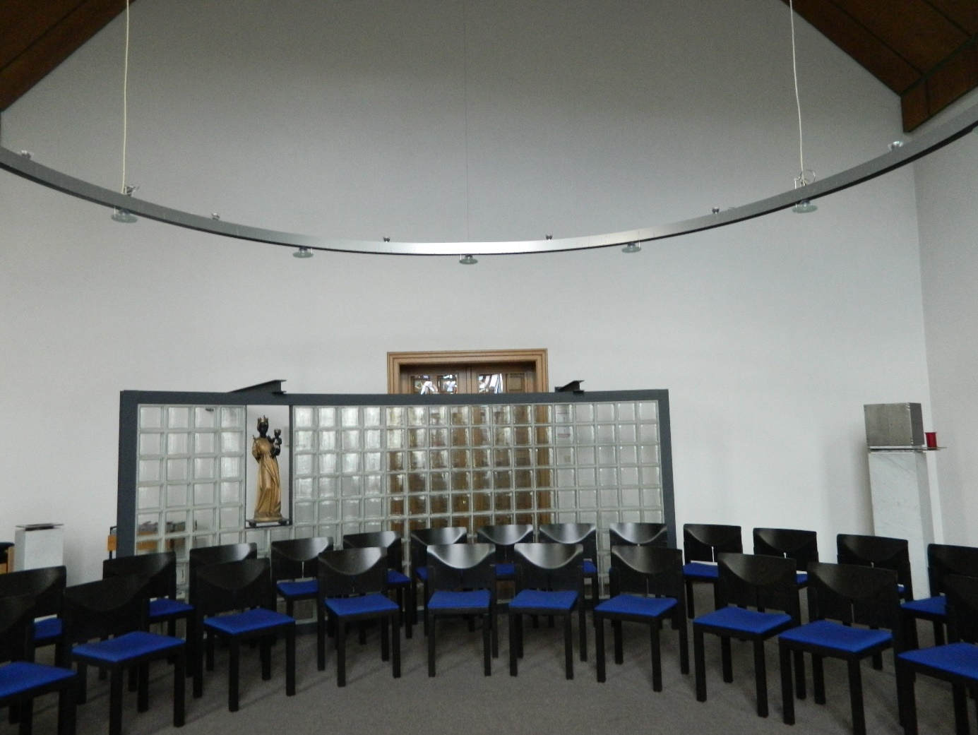 Die römisch-katholische Hauskapelle im Hotel St. Michael befindet sich in der zweiten Etage des gleichnamigen Hotels in Tauberbischofsheim im Main-Tauber-Kreis. Die Hauskapelle im Hotel St. Michael wurde im Jahre 1891 gemeinsam mit dem Gebäude des Hotels St. Michael errichtet. Die Hauskapelle bietet Platz für etwa 50 Personen. Die bunt verzierten Fenster der Kapelle stammen aus dem Jahre 1891 (Entstehungsjahr des Hauses), als das Erzbischöfliche Knabenkonvikt, eine Vorgängerschule des Matthias-Grünewald-Gymnasiums, mit Wohnheim, Internat und Kapelle für auswärtige Schüler errichtet wurde.